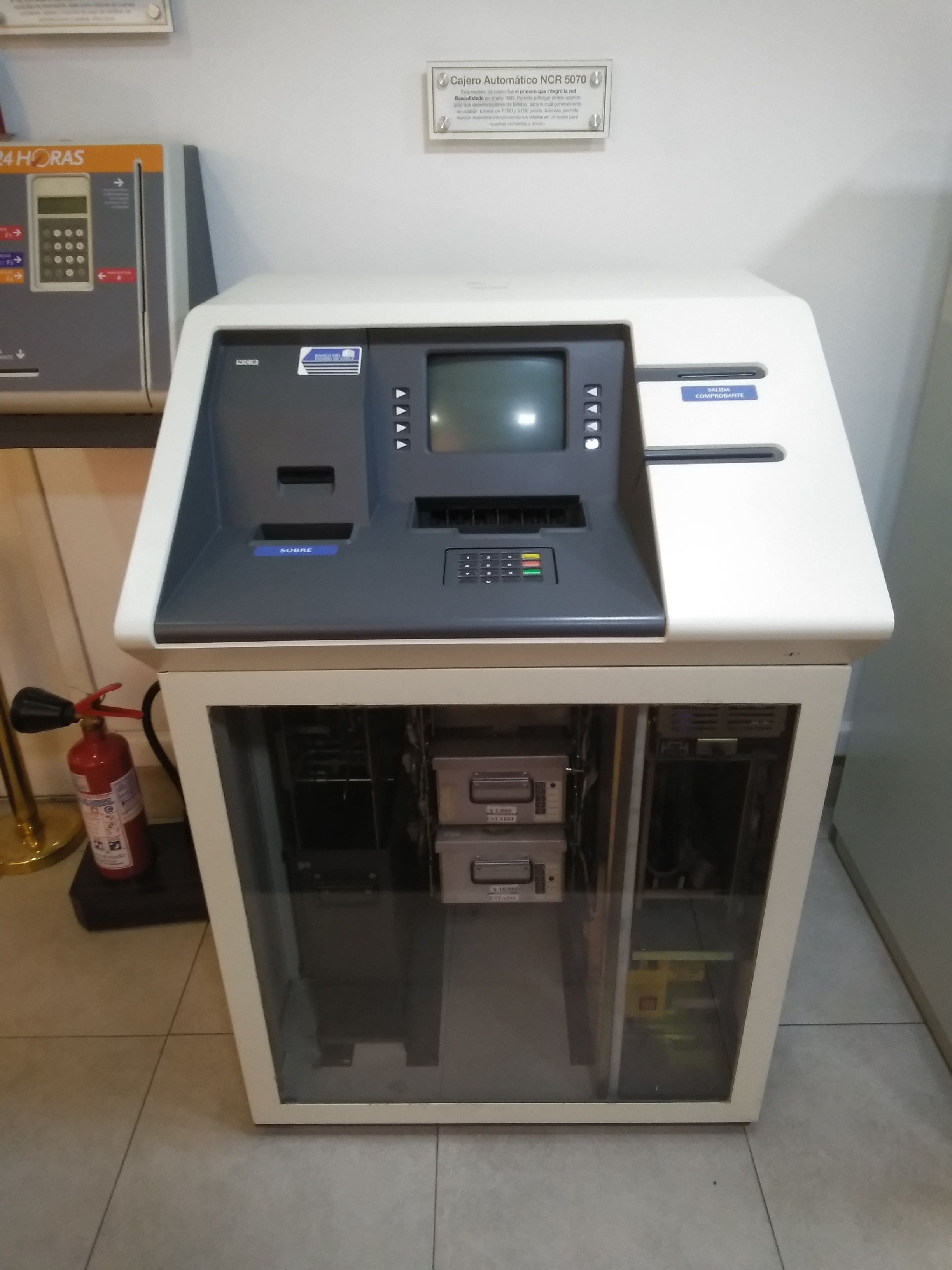 Este modelo de cajero fue el primero que integró la red BancoEstado en 1989. Permite entregar dinero usando sólo dos denominaciones de billetes, para lo cual se usaban generalmente billetes de 1000 y 5000 pesos. Además, permite realizar depósitos introduciendo los billetes en un sobre para cuentas corrientes y ahorro. Actualmente en exhibición en el Museo del Ahorro.